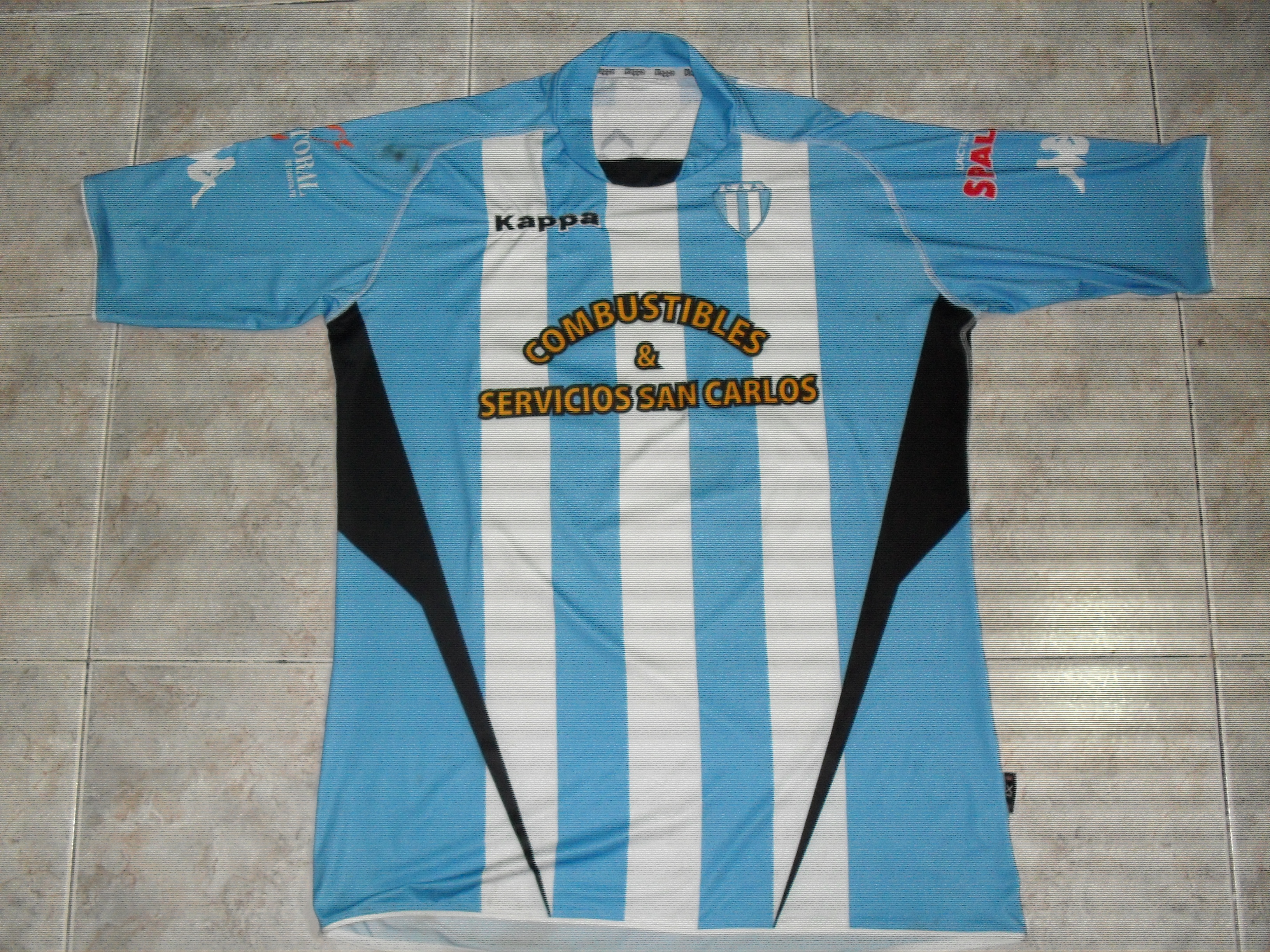 hermosa camiseta